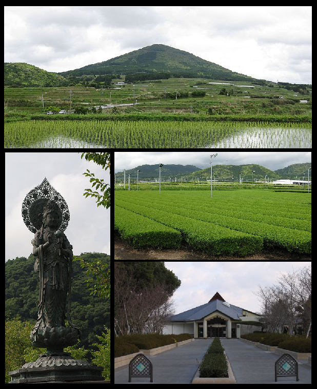 南九州市のモンタージュ画像。 上段：大野岳、左中下段：清水岩屋公園の仏像、右中段：南薩台地に広がる茶畑、右下段：知覧特攻平和会館。